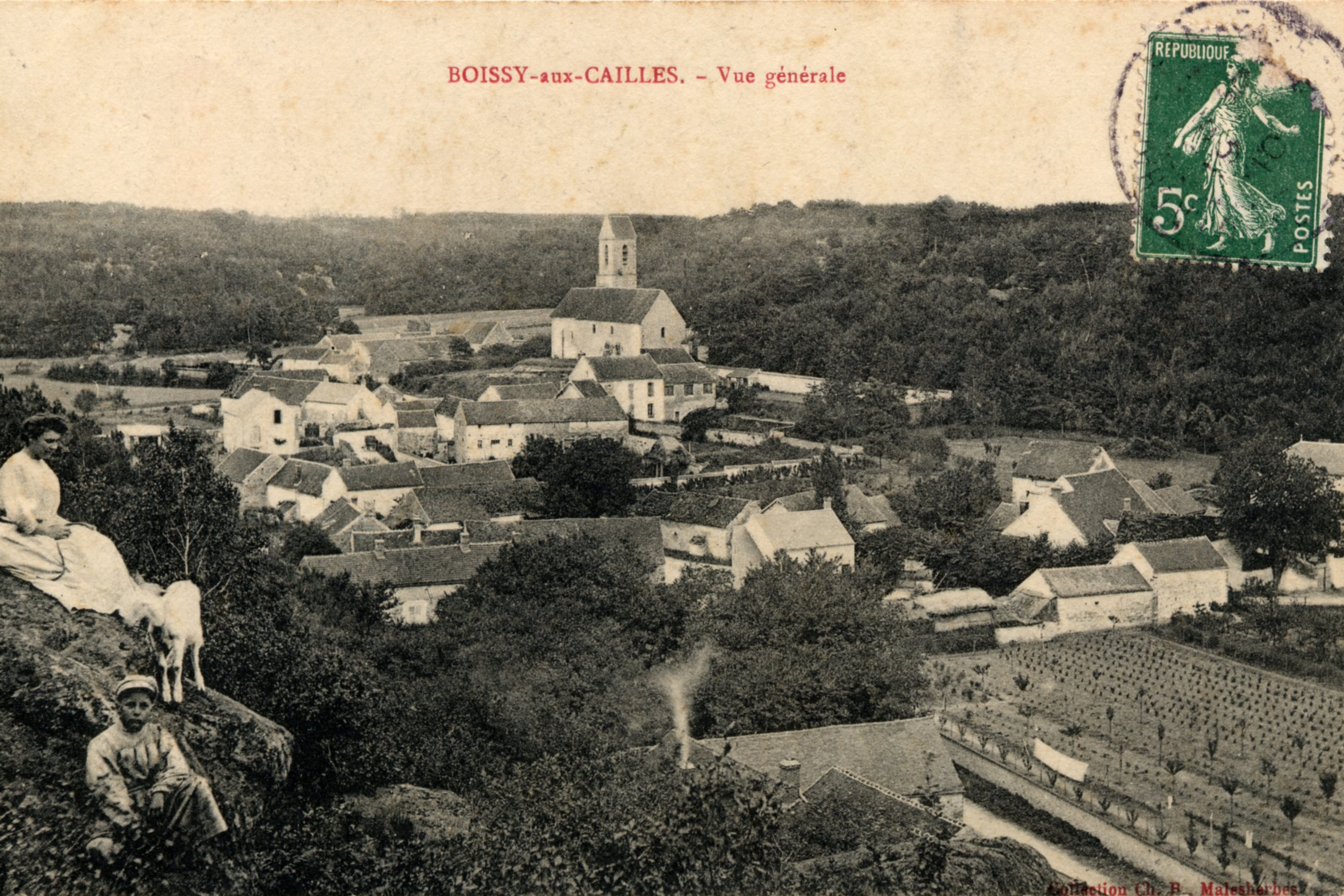 Carte postale Vue générale de Boissy